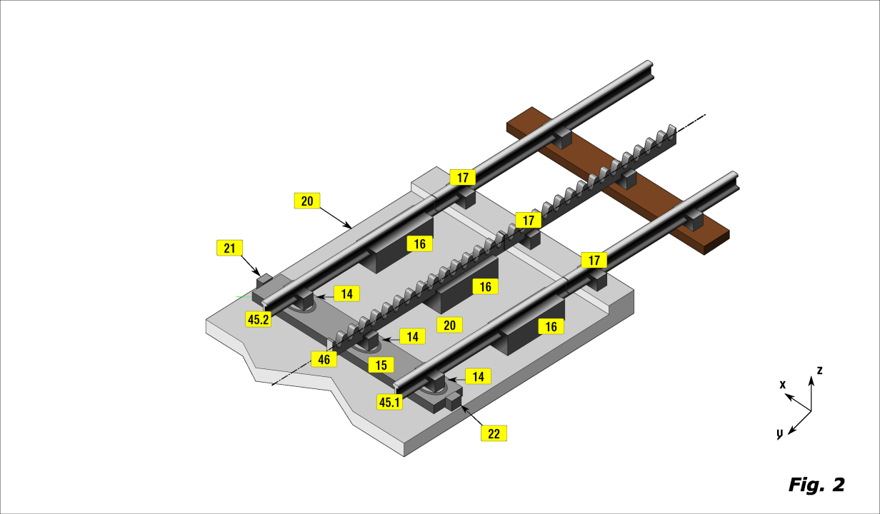 GLEISWEICHE / TRACK POINTS / AIGUILLAGE: RIGI-VTW 2000 Europäisches Patentamt / EUROPÄISCHE PATENTSCHRIFT / EP 1 214 473 B1 / 20.07.2005 Patentblatt 2005/29 / Anmeldenummer: 00958083.8 Anmeldetag: 18.09.2000 / Int Cl.7: E01B 25/06 / Internationale Anmeldenummer: PCT/CH2000/000502 Internationale Veröffentlichungsnummer: WO 2001/021894 (29.03.2001 Gazette 2001/13)